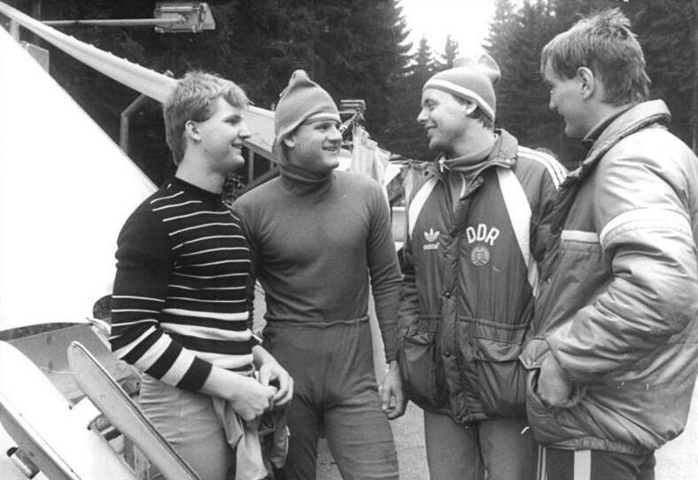 Michael Walter, Herbert Wilhelm, Stefan Krause, Heiko Wietesch ADN-ZB Schaar sei-18.10.1985-Oberhof: Rennschlitten-Auftakt und traditionelle Handicaprennen-Einzel-Weltmeister Michael Walter (2.v.r.) wertet mit den Junioren Herbert Wilhelm, Stefan Krause und Heiko Wietesch (vlnr) die ersten "Fuhren" aus.